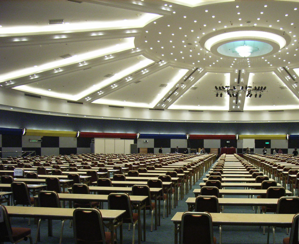 HITEC, KLN BAY, Hong Kong (BY USER:WuLuoKlnB)